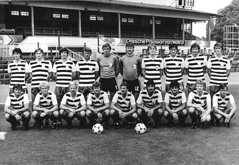 ADN-ZB-Kasper-2.9.82-zin-Bez. Gera: Fußball-UEFA-Cup-Teilnehmer der DDR vorgestellt: FC Carl Zeiss Jena. Die Mannschaft aus der Saalestadt ist einer der drei Vertreter des DFV der DDR im UEFA Cup 1982-83. Die Elf trifft in der ersten Runde am 15.9. (in Jena) und 29.9. (in Bordeaux) auf die französische Mannschaft von Girendins Bordeaux. Hintere Reihe v.l.n.r.: Stefan Meixner, Ullrich Oevermann, Jürgen Raab, Rüdiger Schnuphase, Torhüter Hans-Ullrich Grapenthin, Torhüter Thomas Runkewitz, Andreas Bielau, Norbert Kahnt, Gerhard Hoppe und Thomas Ludwig. Vordere Reihe v.l.n.r.: Mannschaftskapitän Lothar Kurbjuweit, Martin Trocha, Matthias Kaiser, konrad Weise, Andreas Krause, Jörg Burow, Uwe Pohl, Fred Steinborn und Wolfgang Schilling.